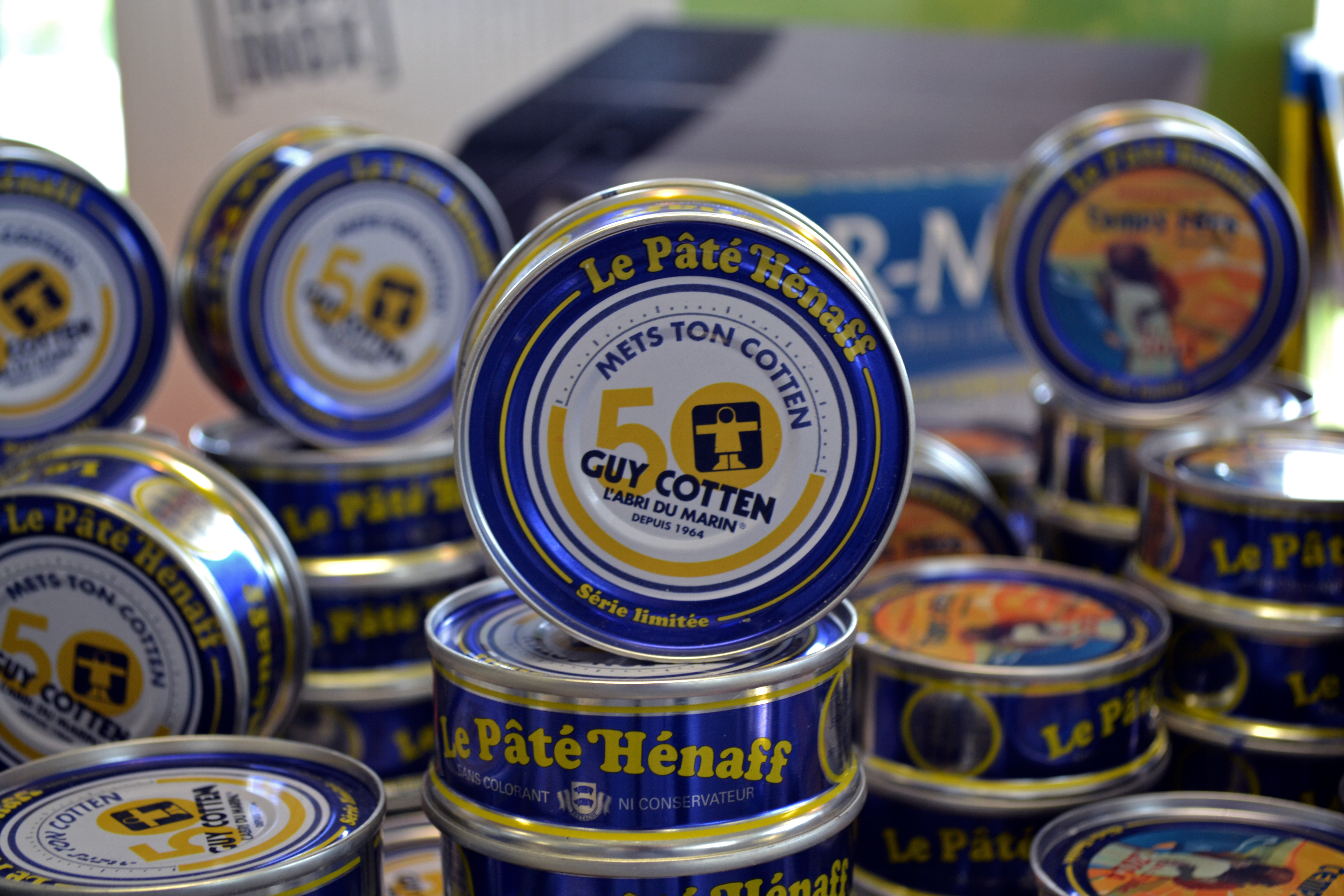 Boîte de Pâté Hénaff série limitée "50 ans Guy Cotten" en 2014 (Temps Fête de Douarnenez en arrière-plan).